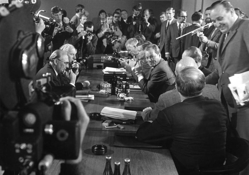 2.10.1969 SPD-FDP Koalitionsverhandlungen in der Landesvertretung Nordrhein-Westfalen Am 3.10.1969 beschließt die FDP einer Koalition mit der SPD zuzustimmen.